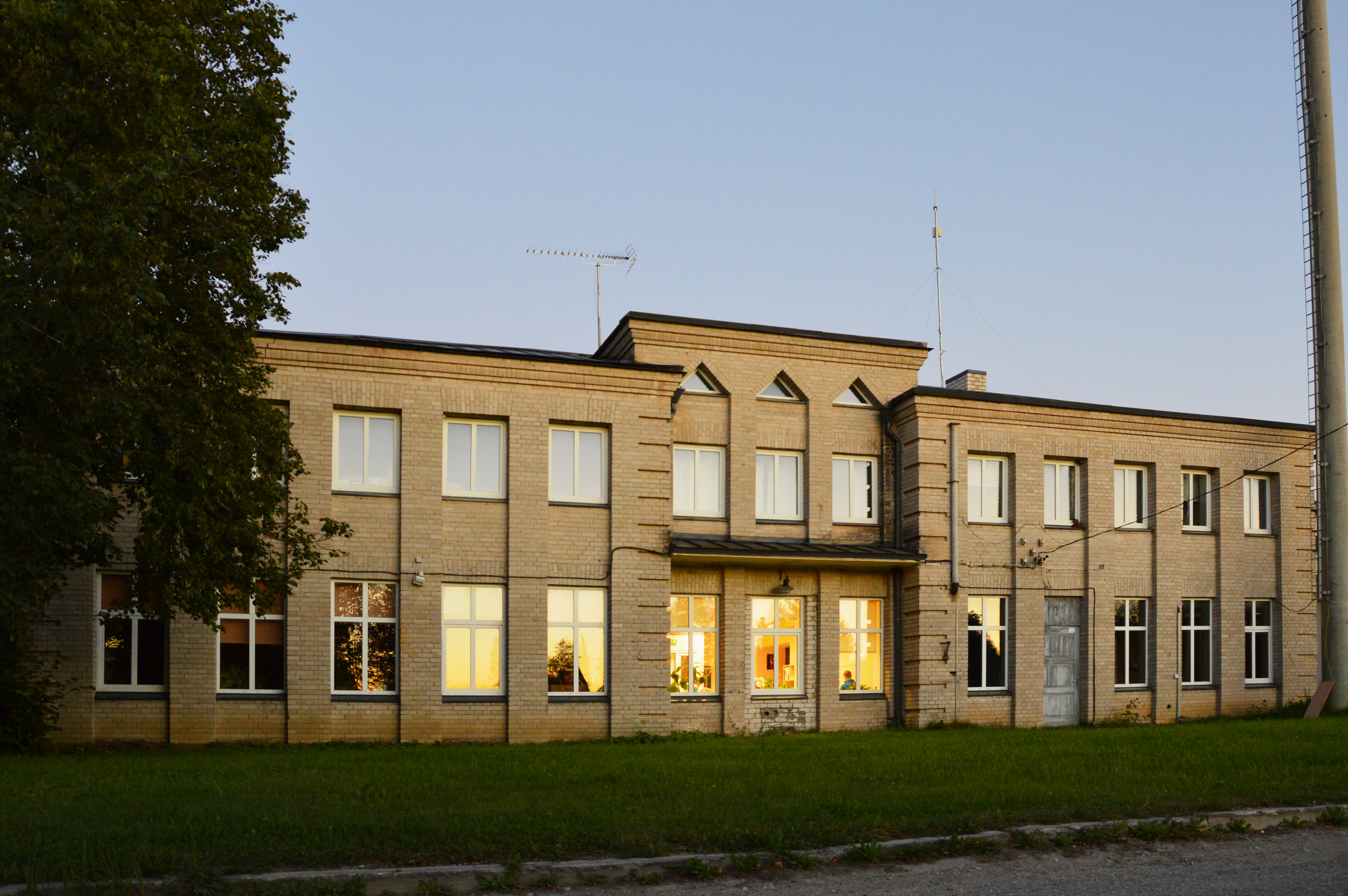 Vana-Vigala raamatukogu hoone